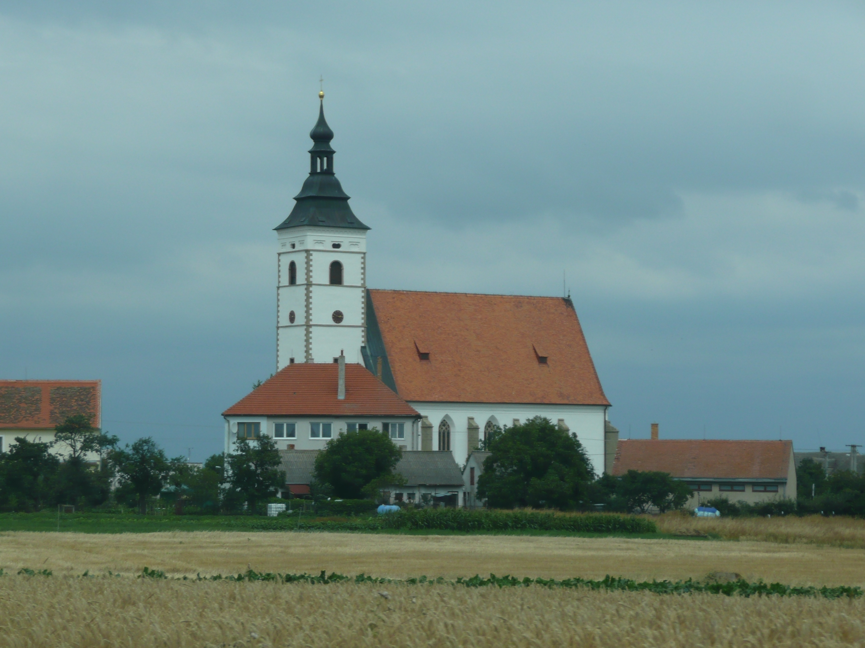 Kostel Nejsvětější Trojice (Běhařovice)